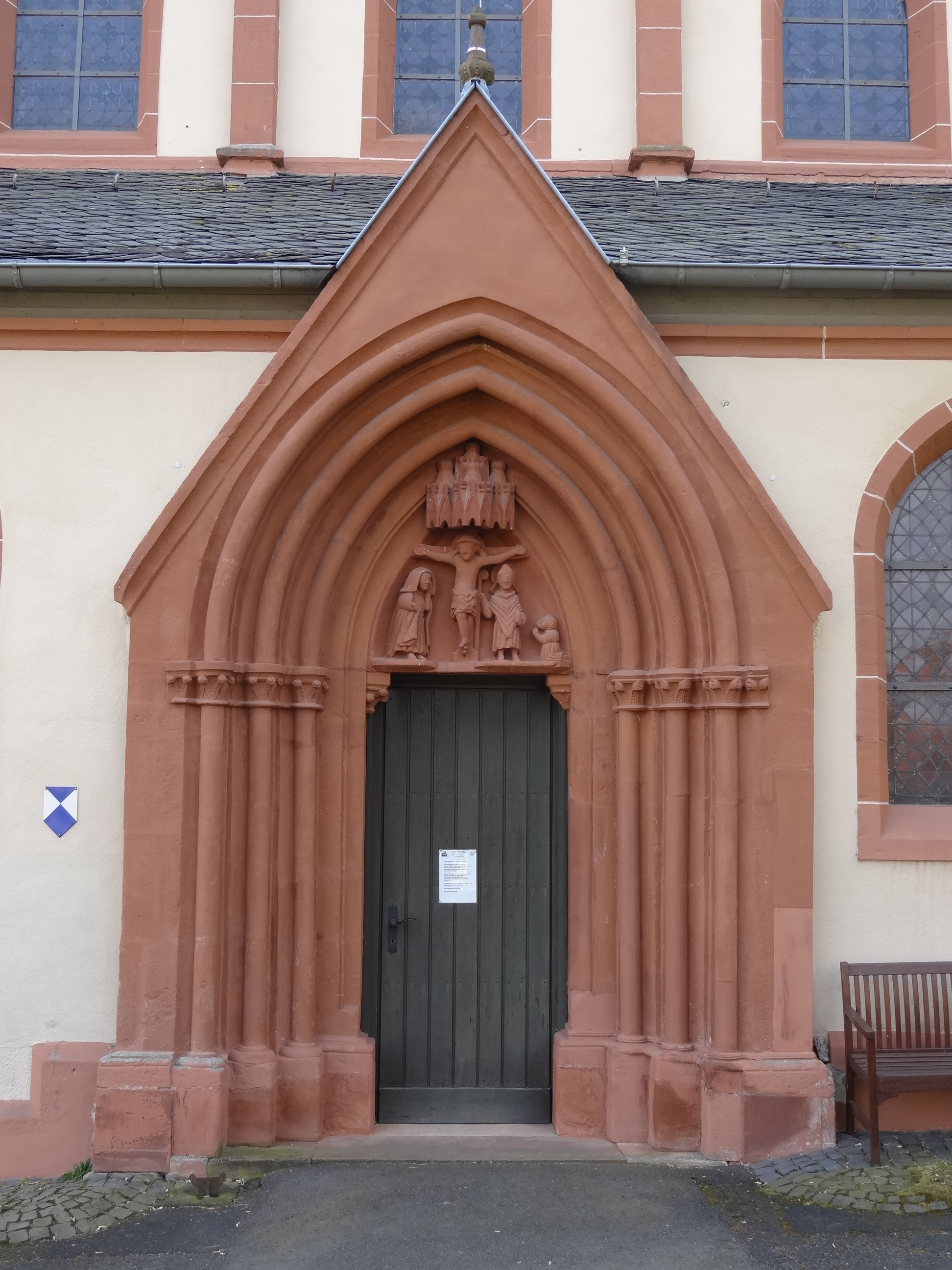 Evang. Pfarrkirche